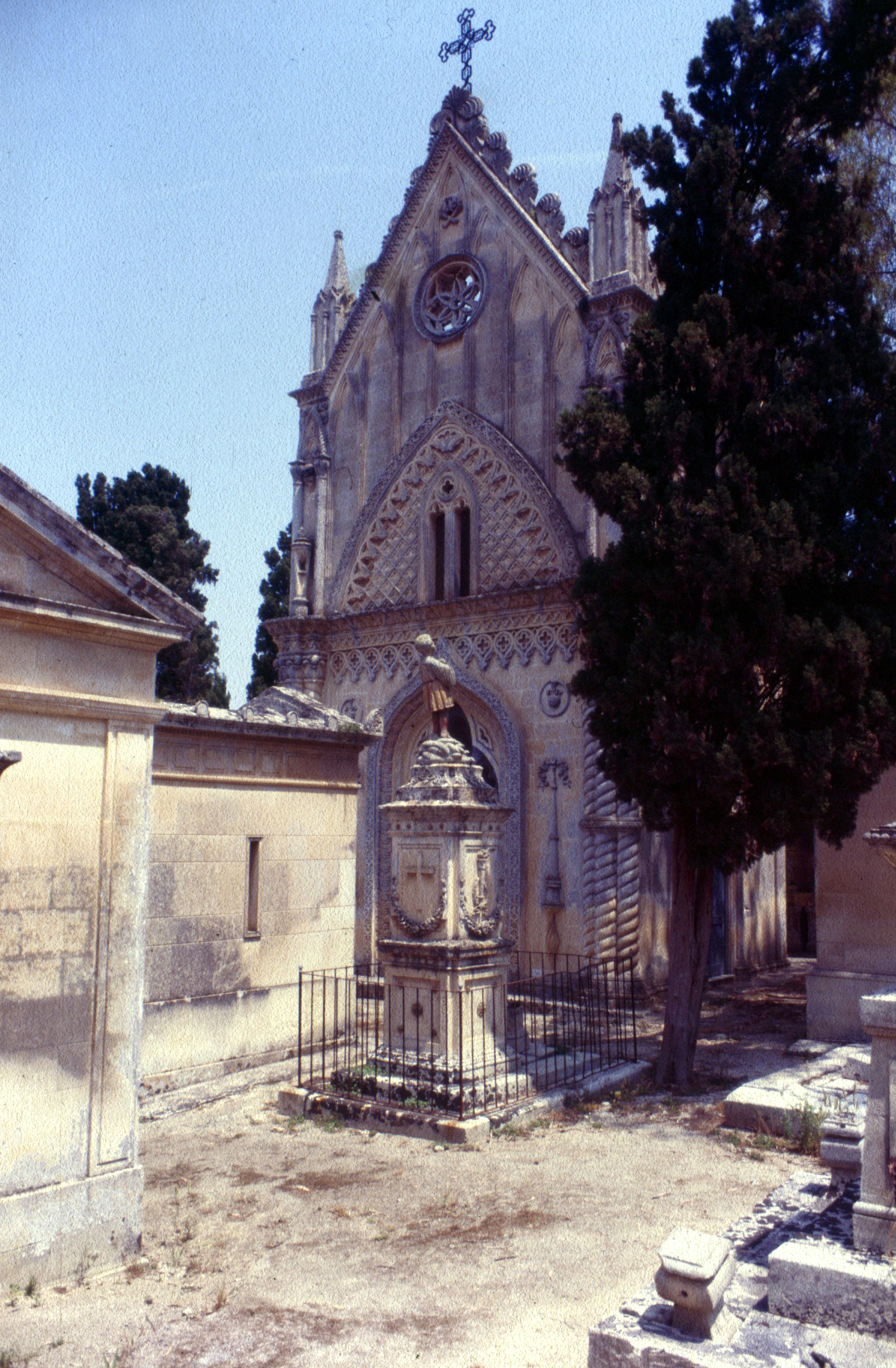 Santi Niccolò e Cataldo (Lecce)